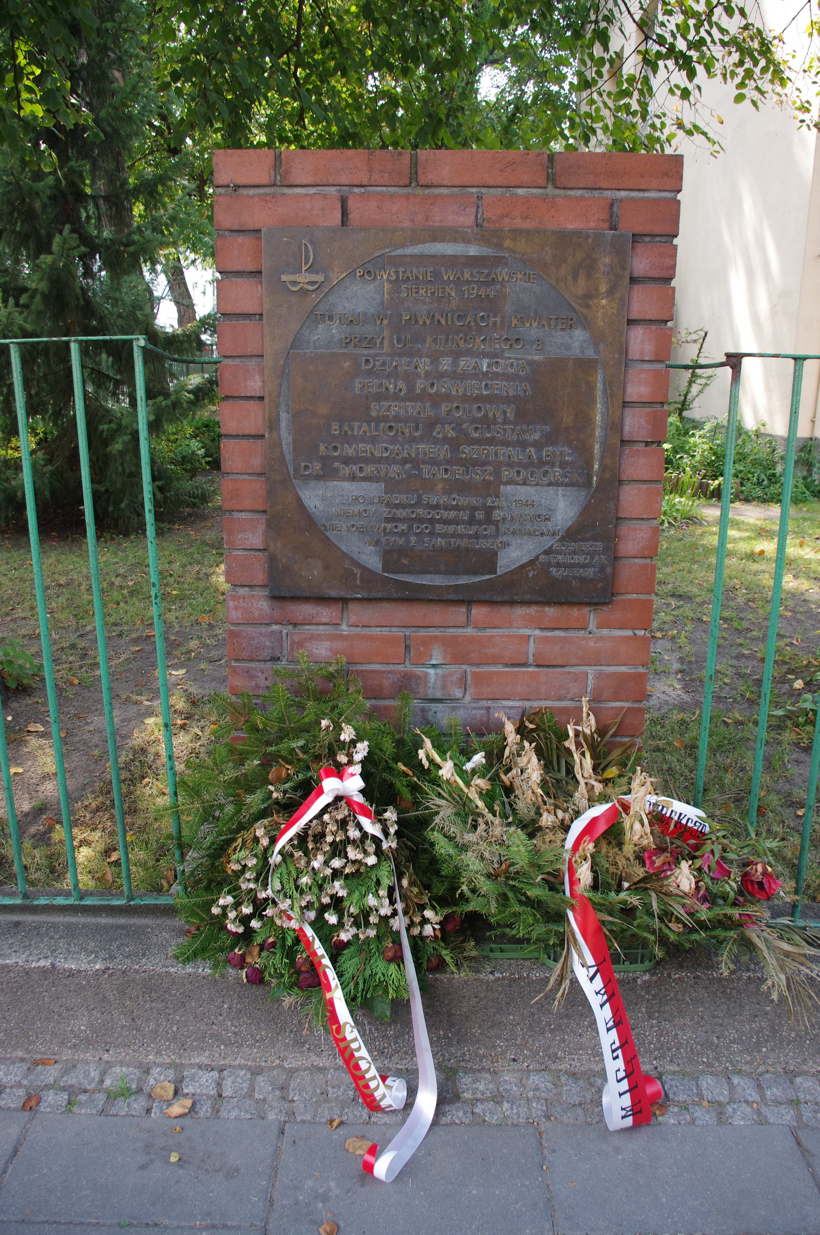 Tablica upamiętniająca szpital polowy Batalionu AK Gustaw prowadzony przez Tadeusza Pogórskiego na ul. Kilińskiego w Warszawie